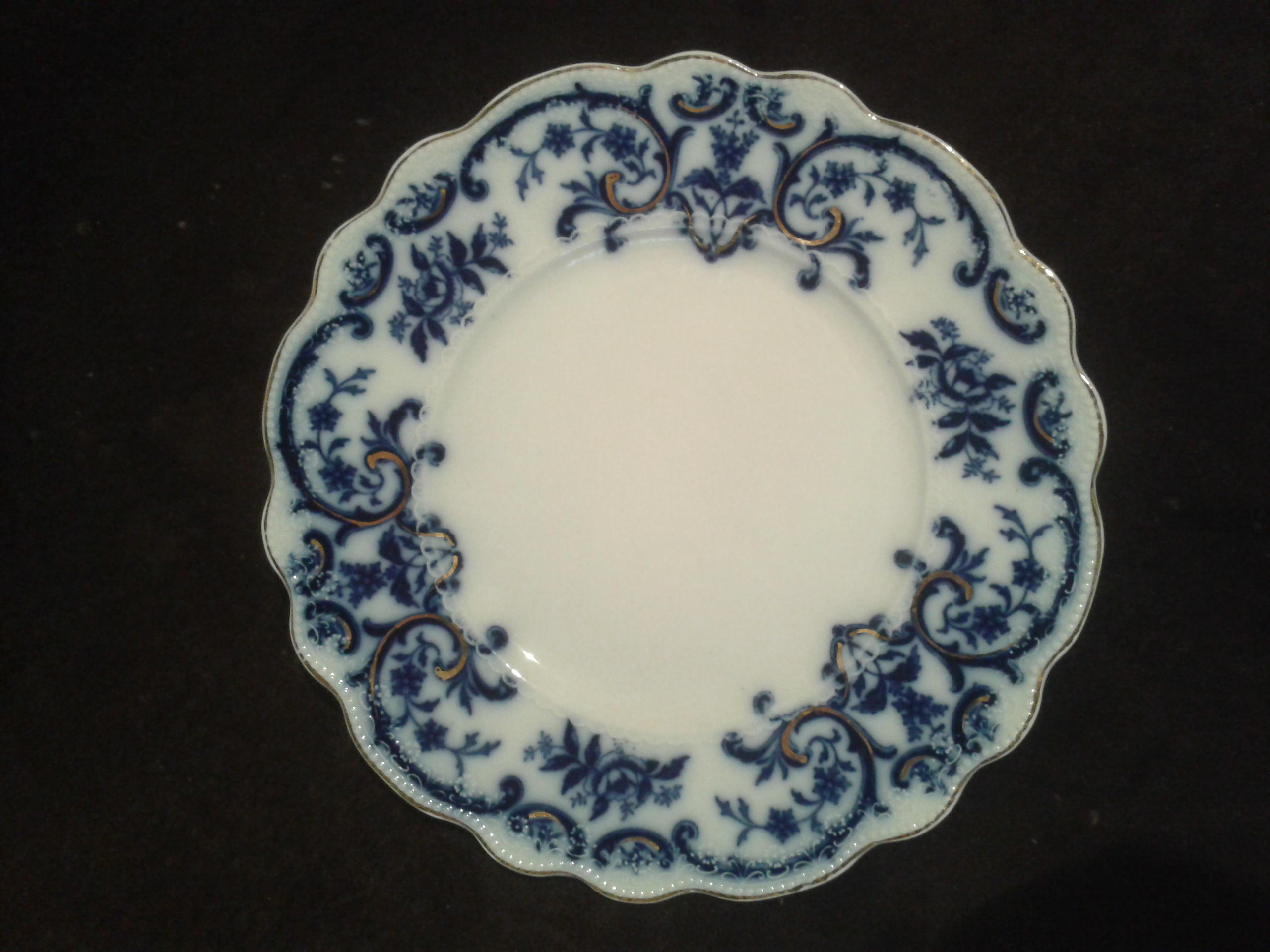 Plato de porcelana inglesa de Portman. S XIX The back is marked in blue -Portman- W.H.Grindley- England